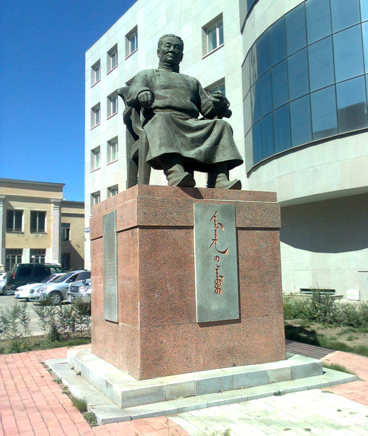 Statue of Jamsrangiin Sambuu in Ulaanbaatar